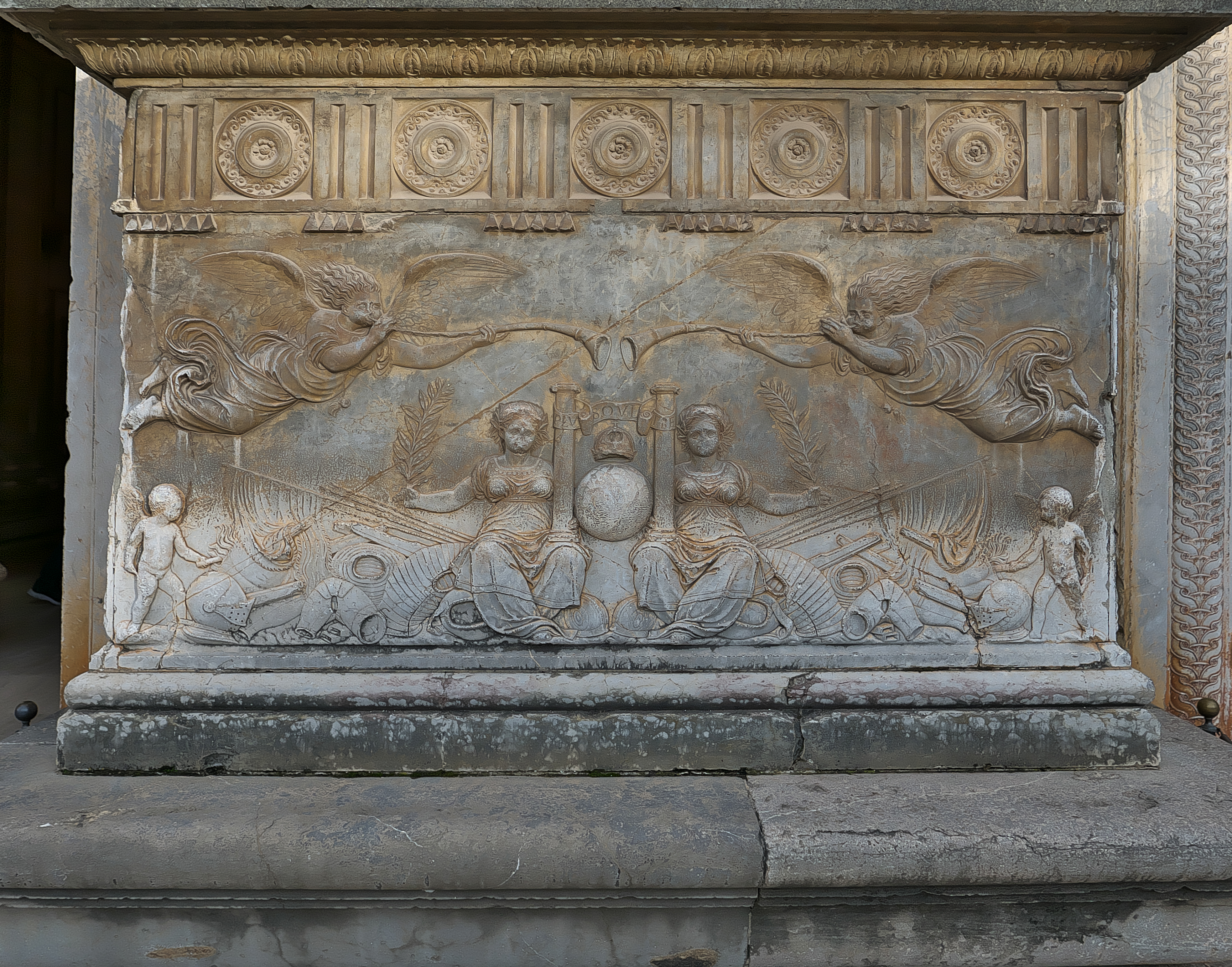 Fachada occidental del Palacio de Carlos V, bajorrelieve de mármol en un pedestal, Juan de Orea (ca. 1551). Se desconoce el autor del programa iconográfico.